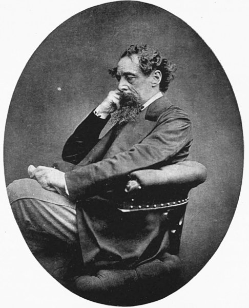 Charles Dickens, 1868